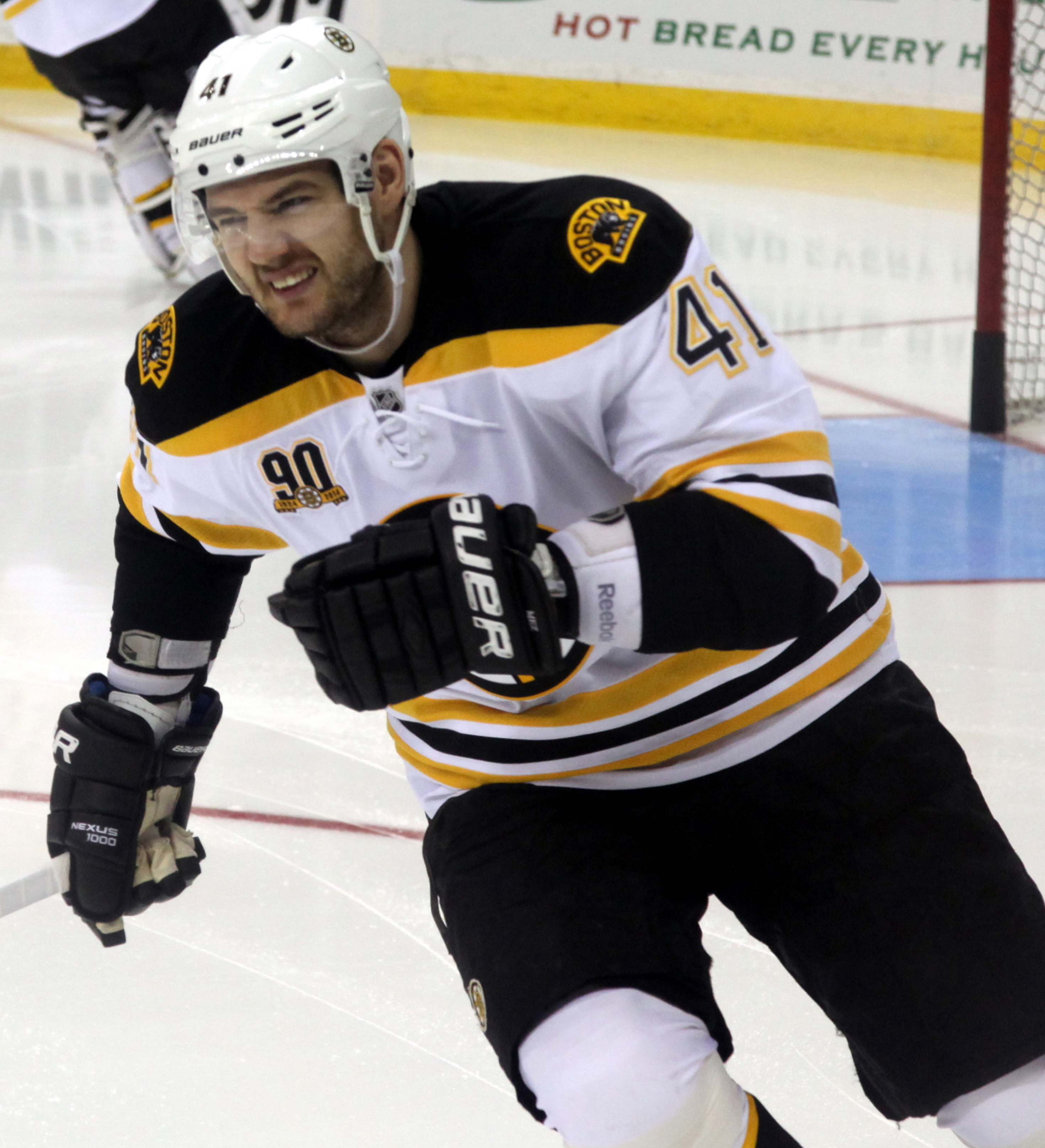 Meszaros in 2014.